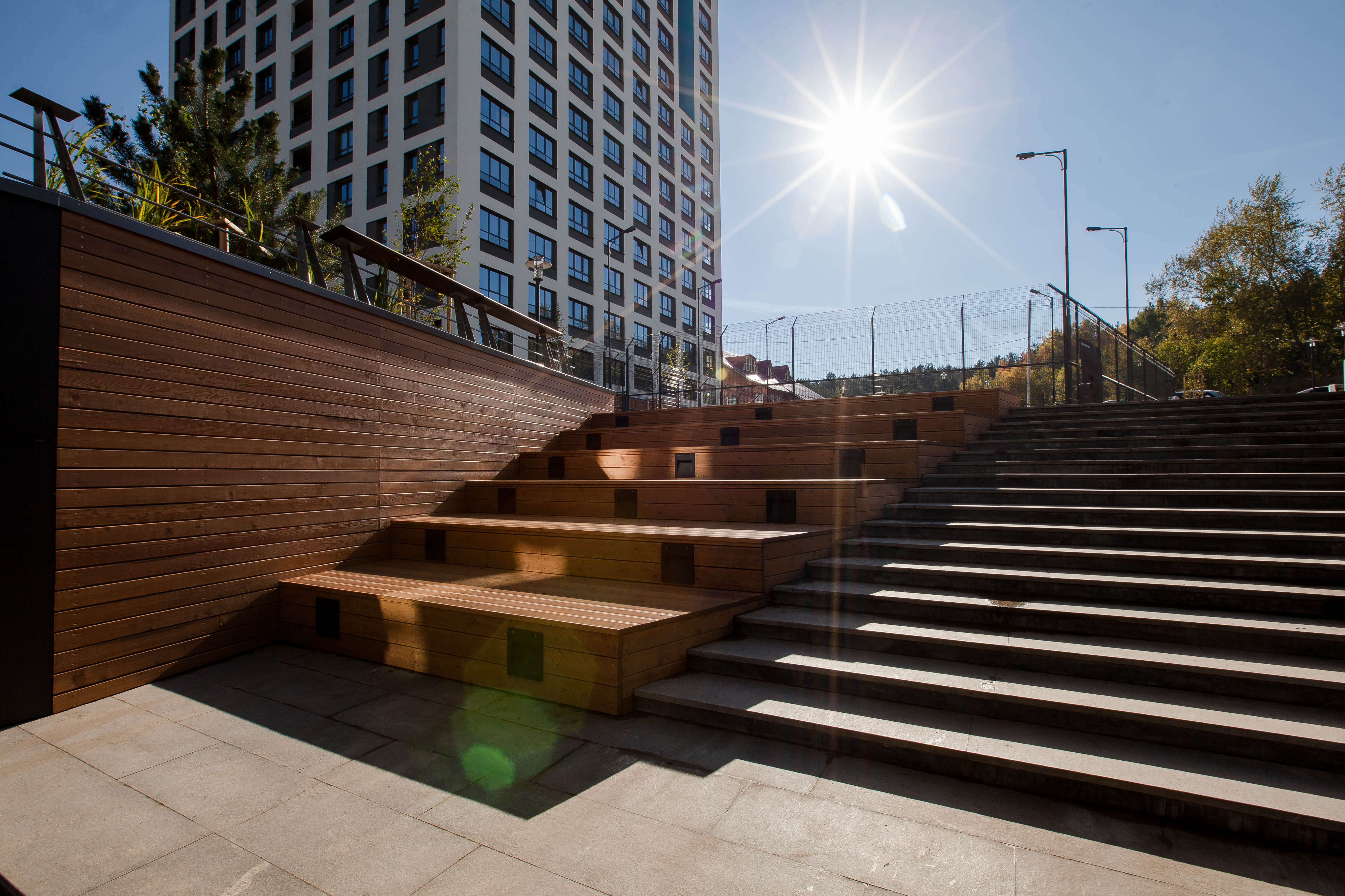 "Каменный ручей". Район Уктус. Екатеринбург